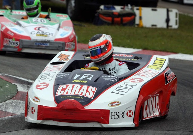 Rubens Barrichello nas 500 Milhas de Kart da Granja Viana em 2009.